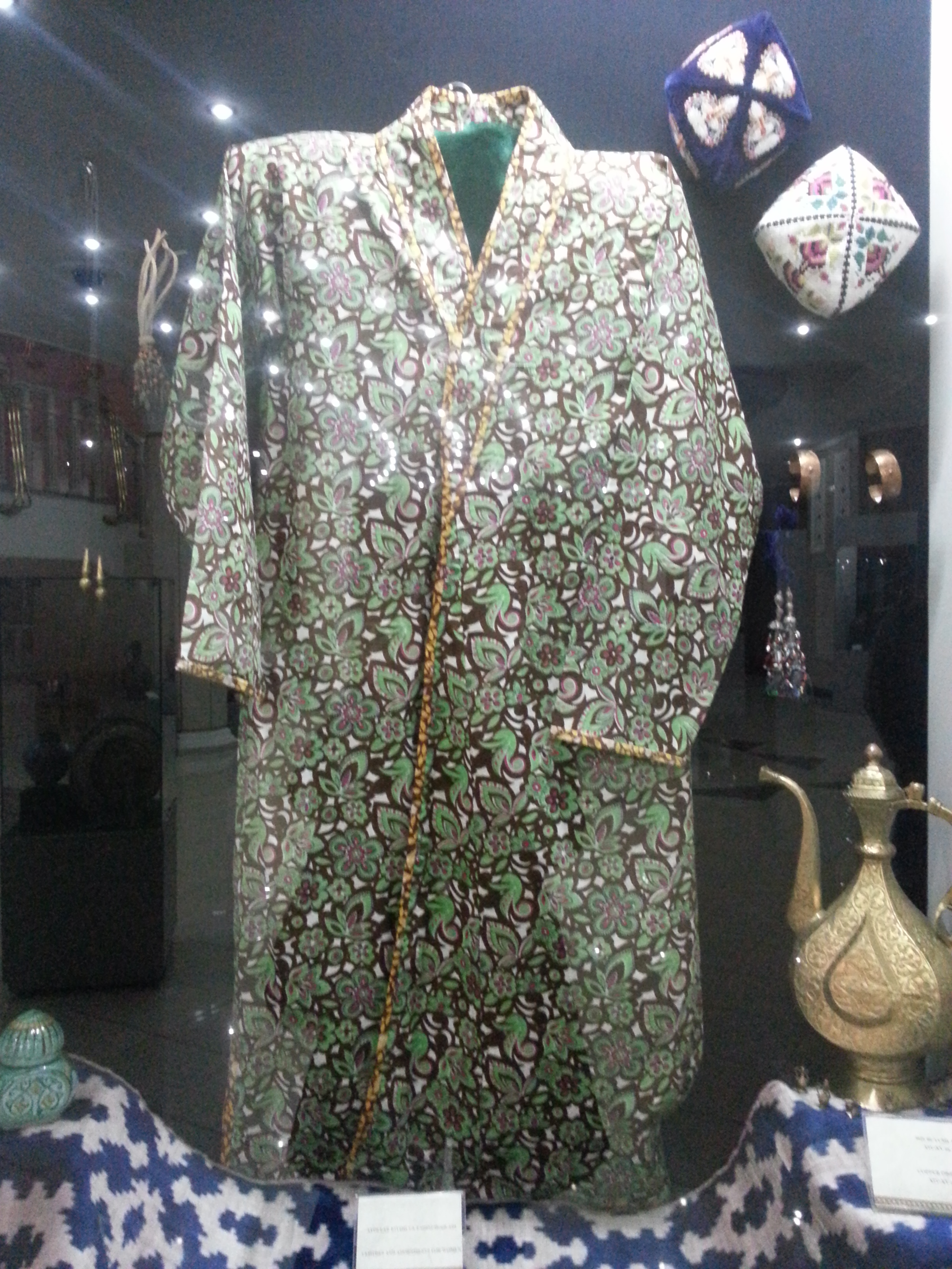 Женская одежда и головные уборы.Музей истории Тимуридов. Ташкент